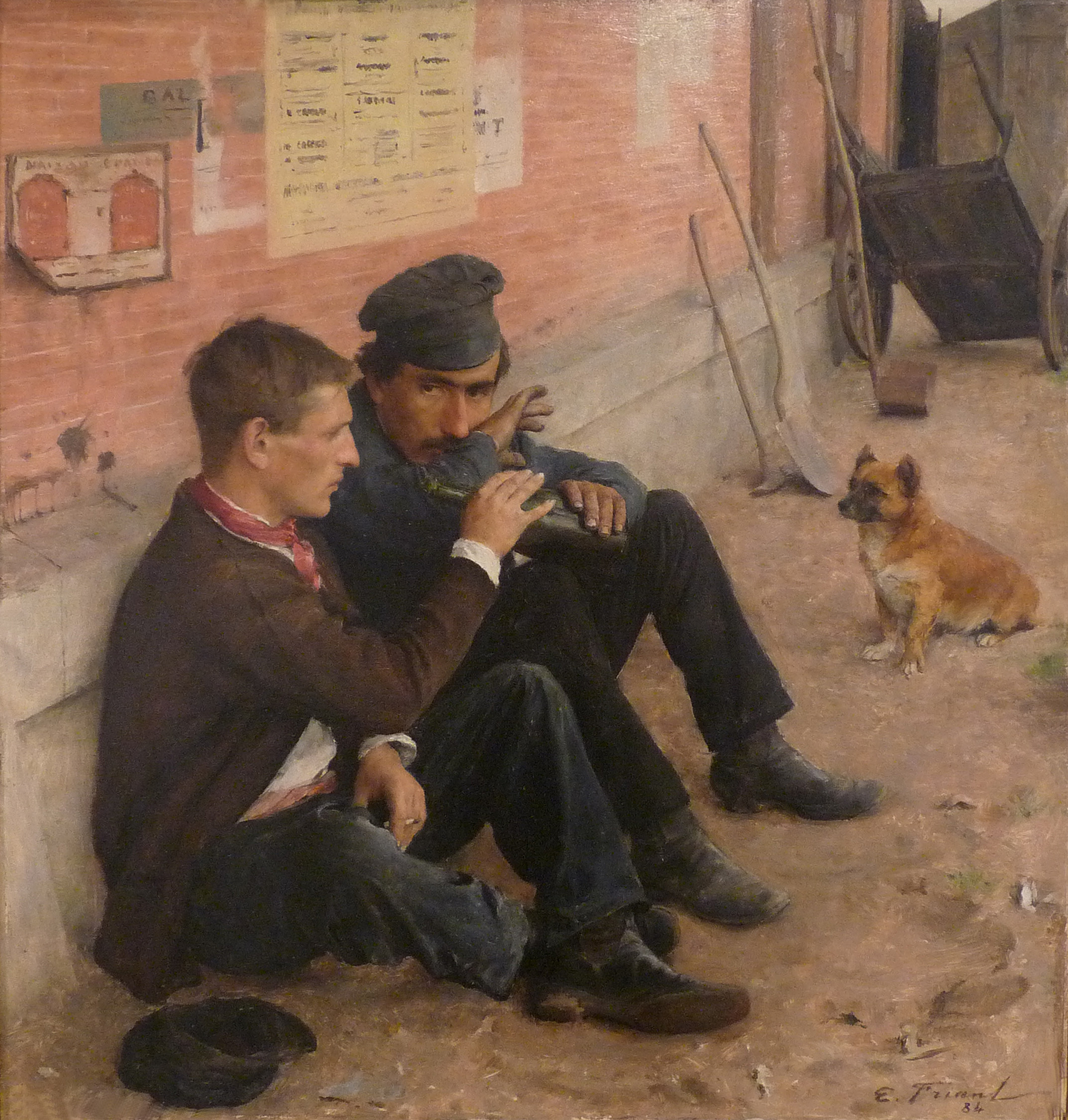 Emile Friant, Les Buveurs ou le travail du lundi, huile sur toile, 1884, Musée des beaux-arts de Nancy